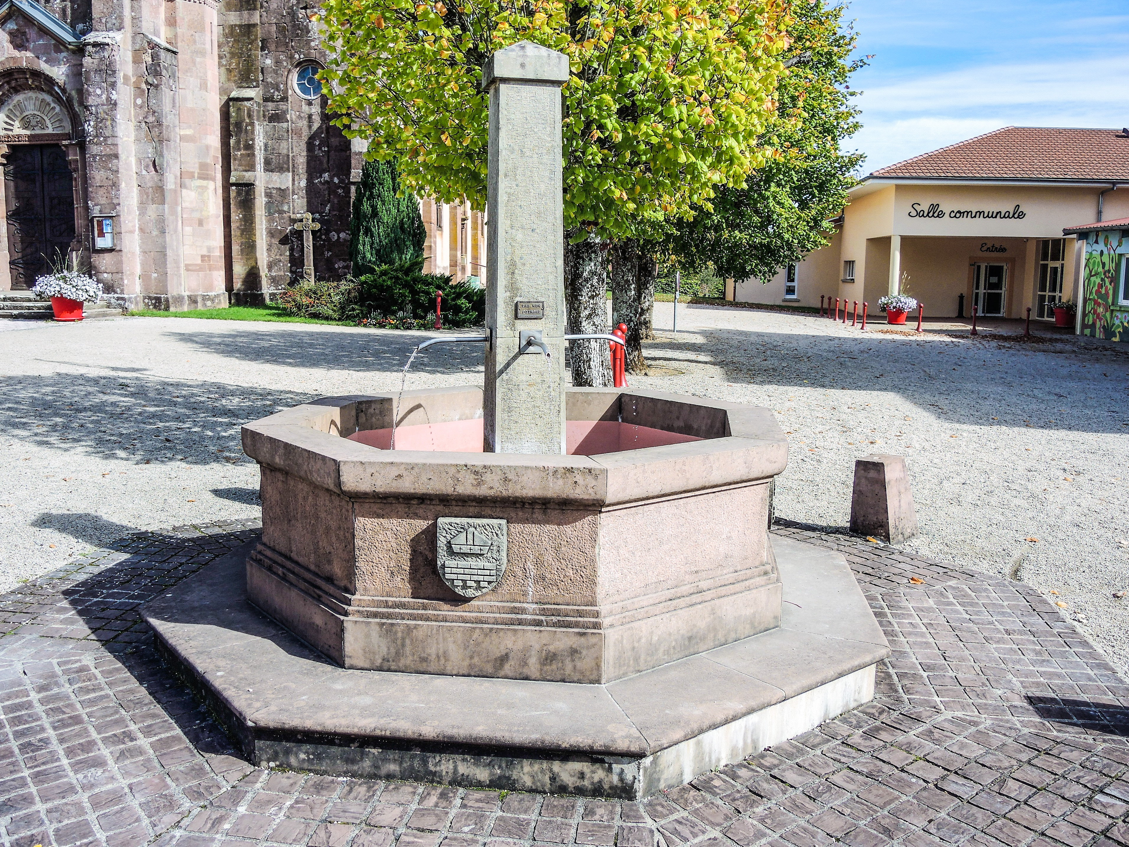 Fontaine devant la mairie du village de saint-Germain-le-Châtelet. Territoire de Belfort.